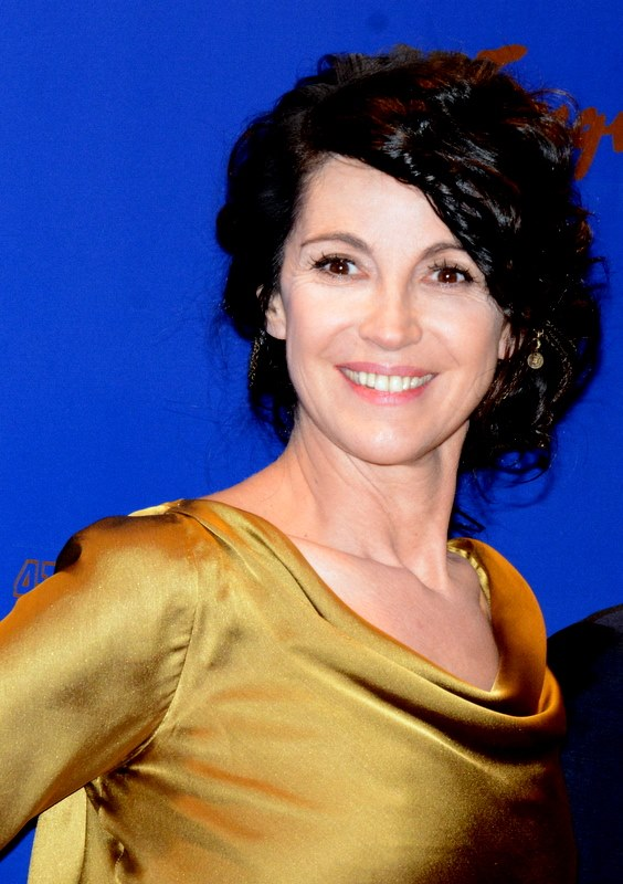 Zabou Breitman à la cérémonie des César